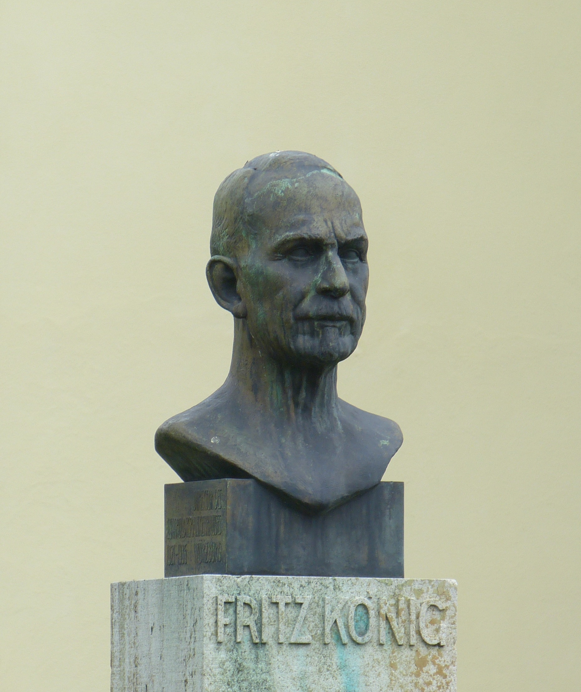 Denkmal für den Chirurgen Fritz König im Luitpoldkrankenhaus Würzburg